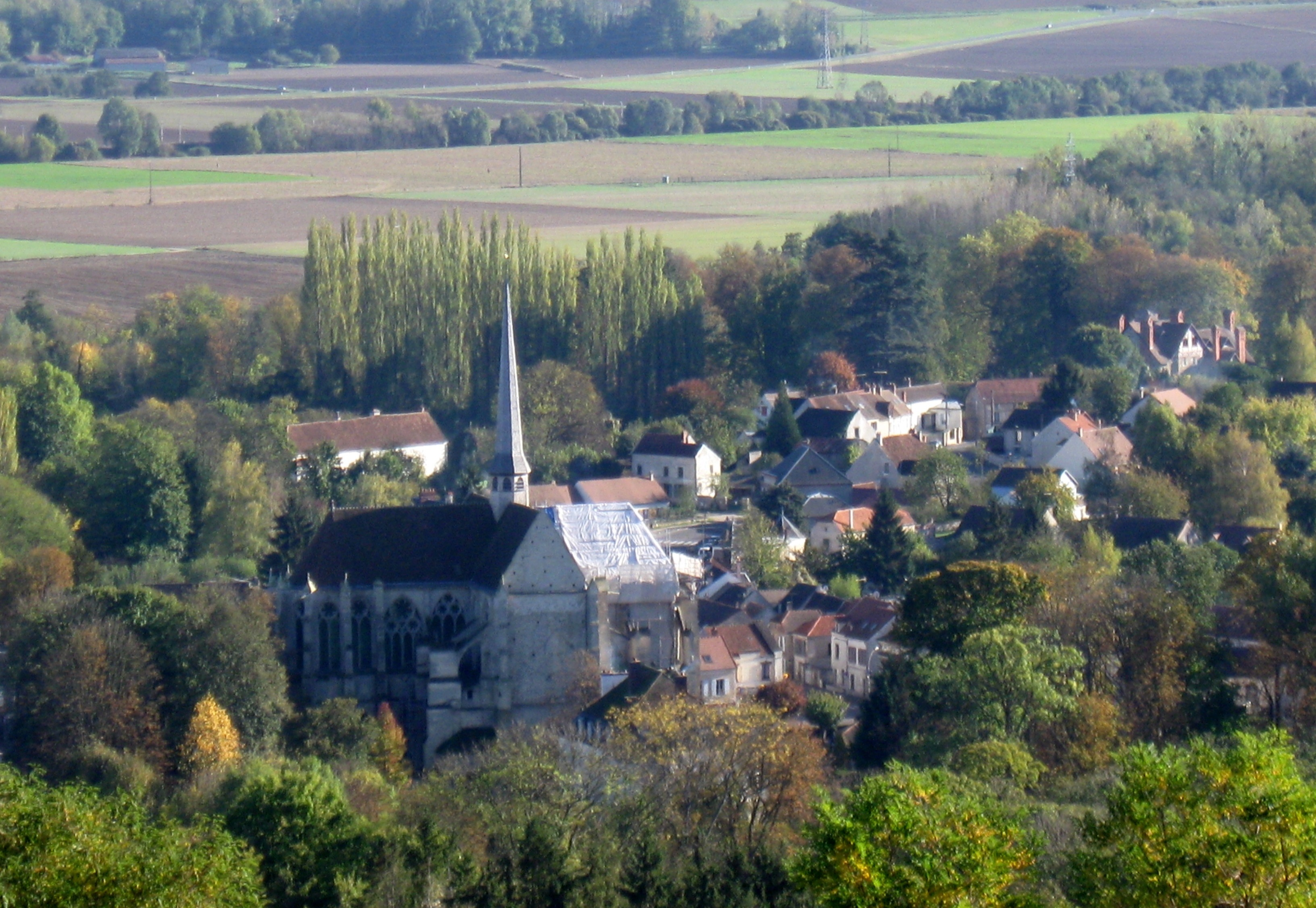 Essômes-sur-Marne et son abbatiale. (département de l'Aisne , région Picardie).